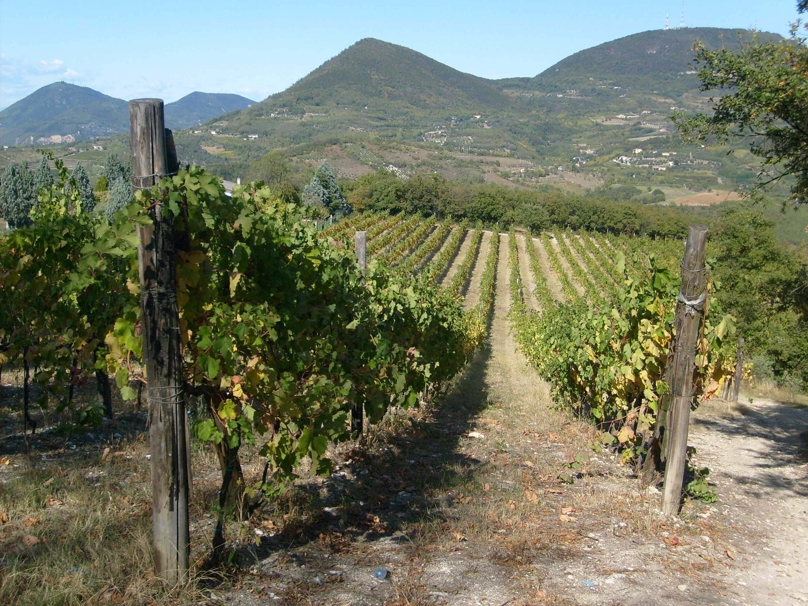 Uliveti sul Monte Cinto